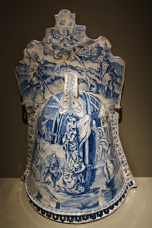 Vuurklok Nederland, Haarlem of Delft circa 1650-1680 aardewerk met tinglazuur NO 8675 Vuurklokken en -stolpen werden 's nachts over het vuur van een open haard geplatst om brand te voorkomen. Meestal zijn ze eenvoudig uitgevoerd in loodglazuur-aardewerk. Op dit rijk gedecoreerde exemplaar in tinglazuuraardewerk is de Aankondiging van de geboorte van Jezus aan de herders en De aanbidding van de drie wijzen afgebeeld. Het voorbeeld voor de schilder waren twee prenten naar ontwerp van Gerard van Groeningen, die zijn opgenomen in de prentbijbel Theatrum Biblicum, voor het eerst uitgegeven in Amsterdam in 1639.